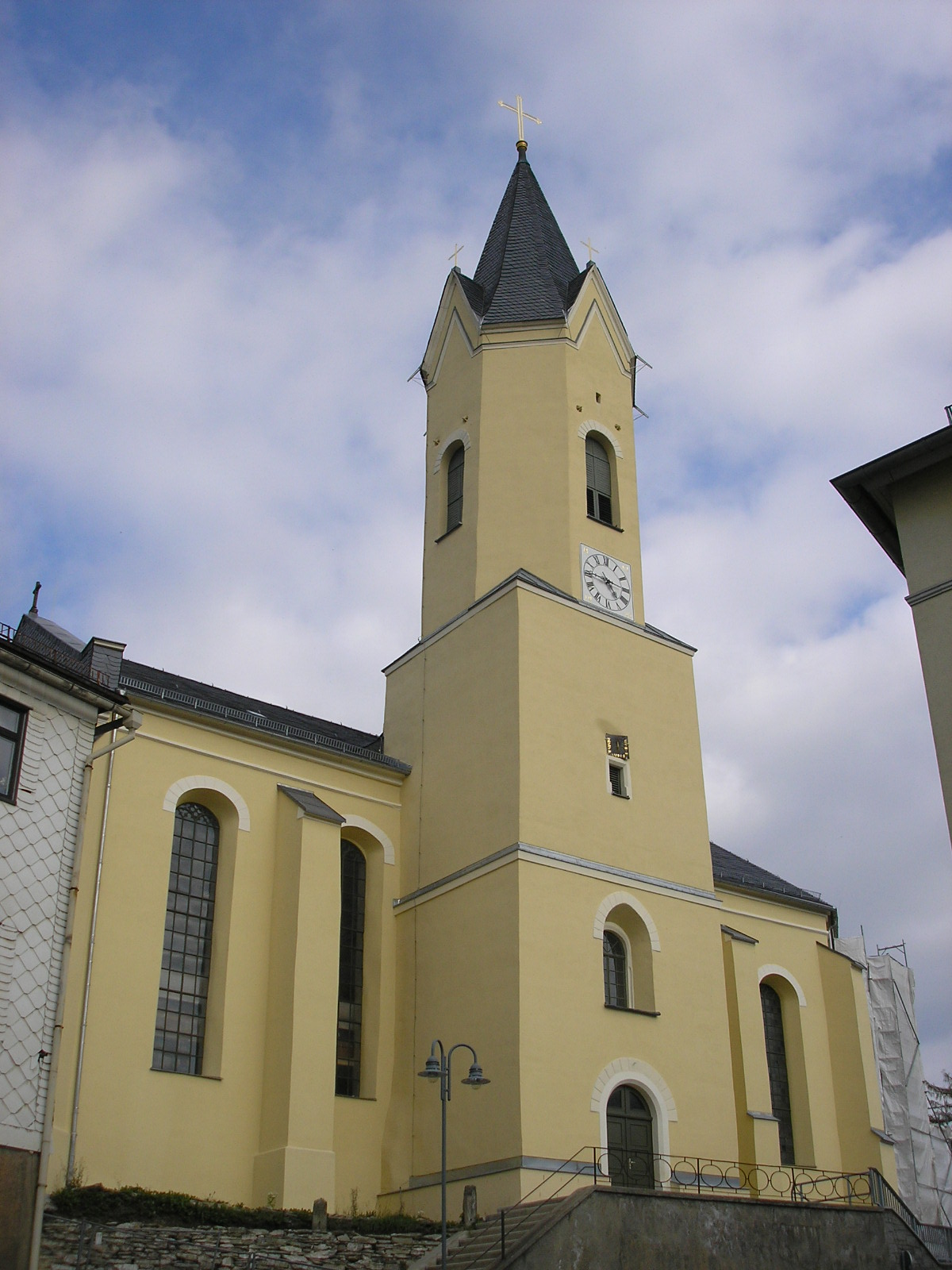 Die Stadtkirche in Bad Lobenstein (Thüringen).